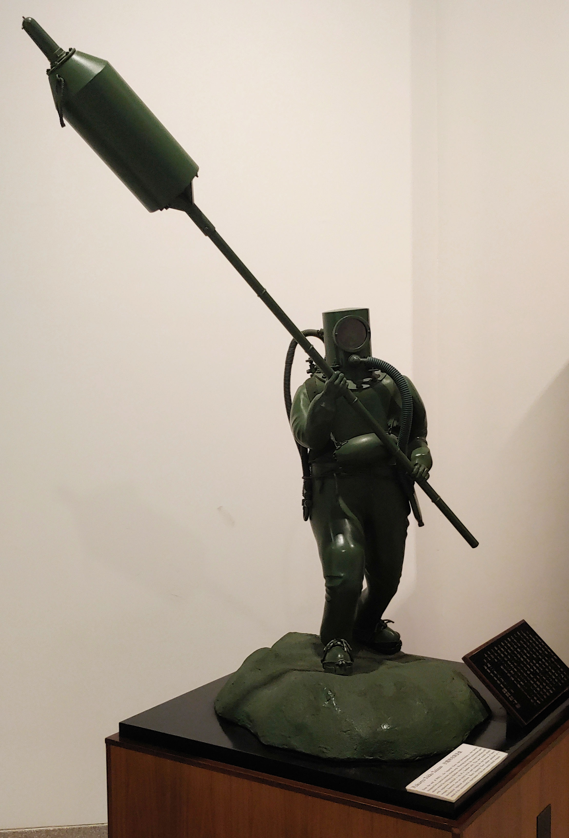 Statue eines Fukuryū, ausgestellt im Kriegsmuseum Yushukan, Yasukuni Jinja, Tokyo, Japan.